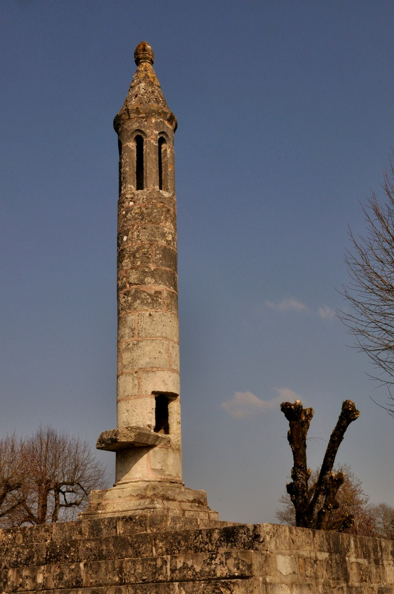 Lanterne des morts - Ciron (Indre)